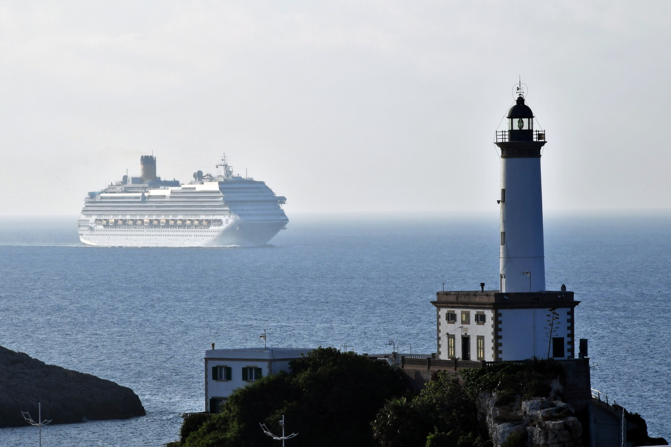 Hafen Ibiza